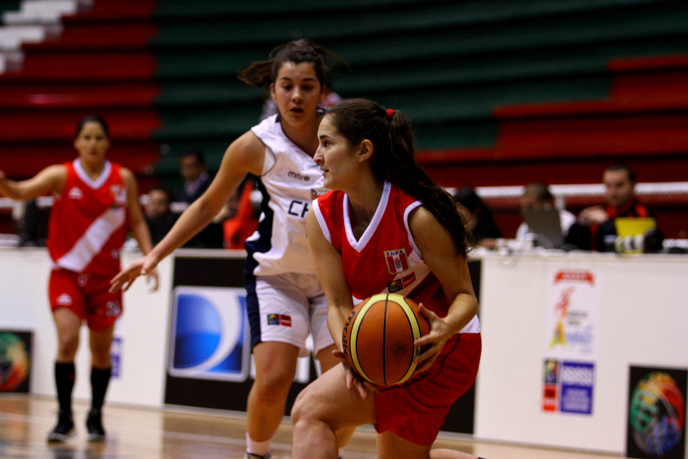 Ambato (tungurahua) 14 de agosto de 2014 (Andes).- Inició el Campeonato Sudamericano de baloncesto Femenino Ambato 2014. Chile (blanco) vs Perú (rojo). Foto: Luis Astudillo C.